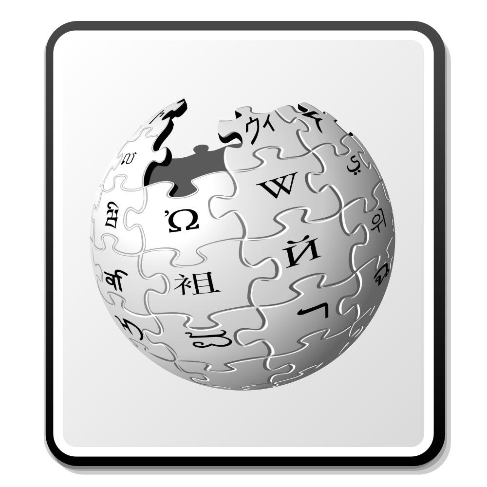 Nuvola Wikipedia icon